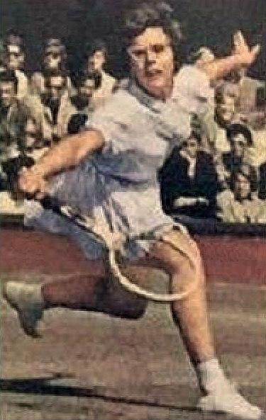 Billie Moffitt-King en 1970 - Campioni dello Sport 1970-1971, n°335